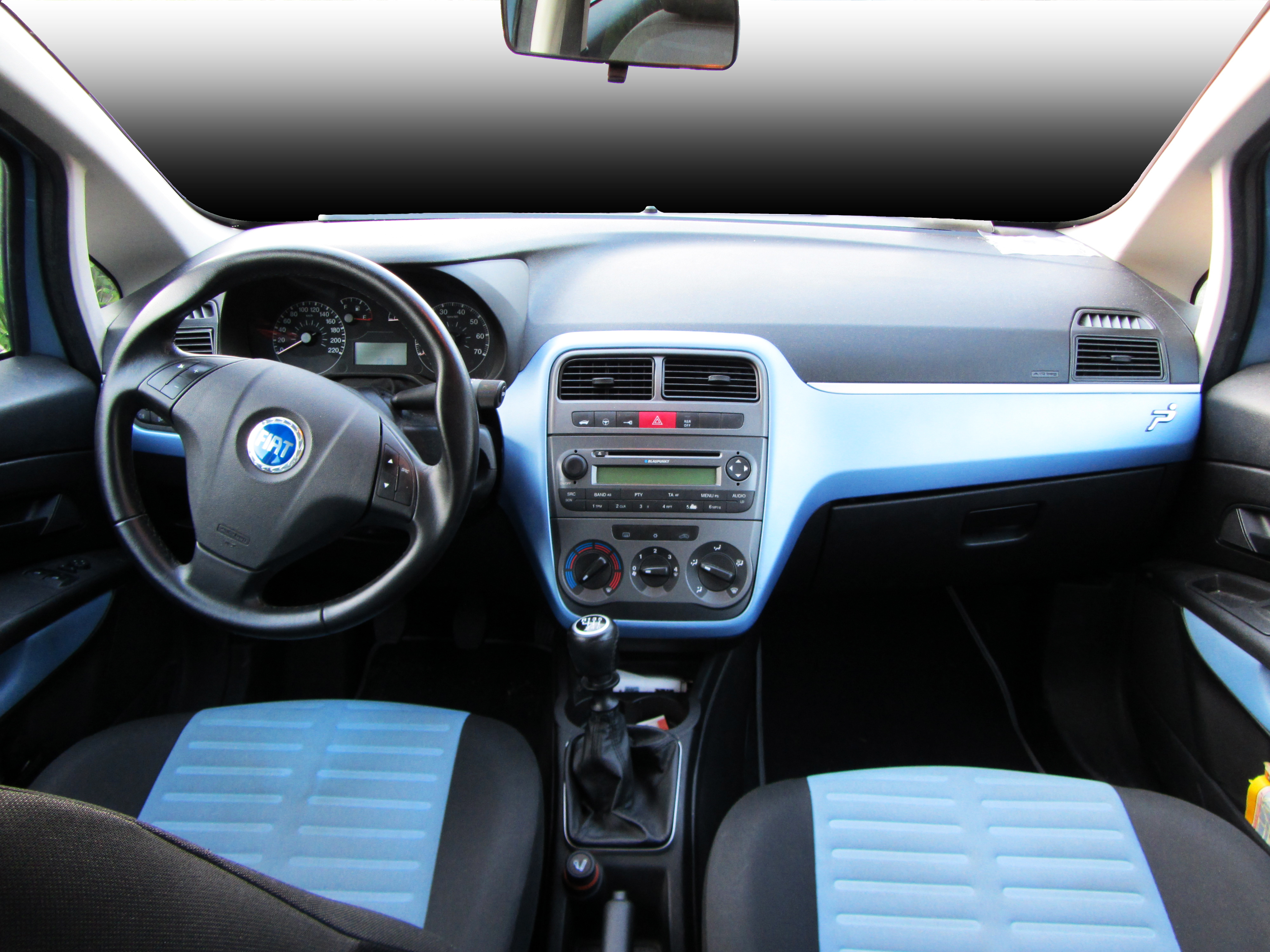 Interni di una Fiat Grande Punto (modificati digitalmente)